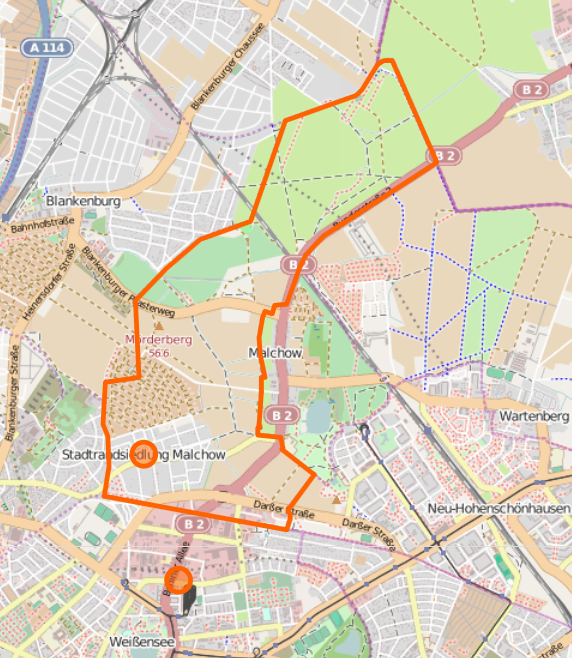 Übersicht von Berlin-Stadtrandsiedlung Malchow (OSM-Screenshot)